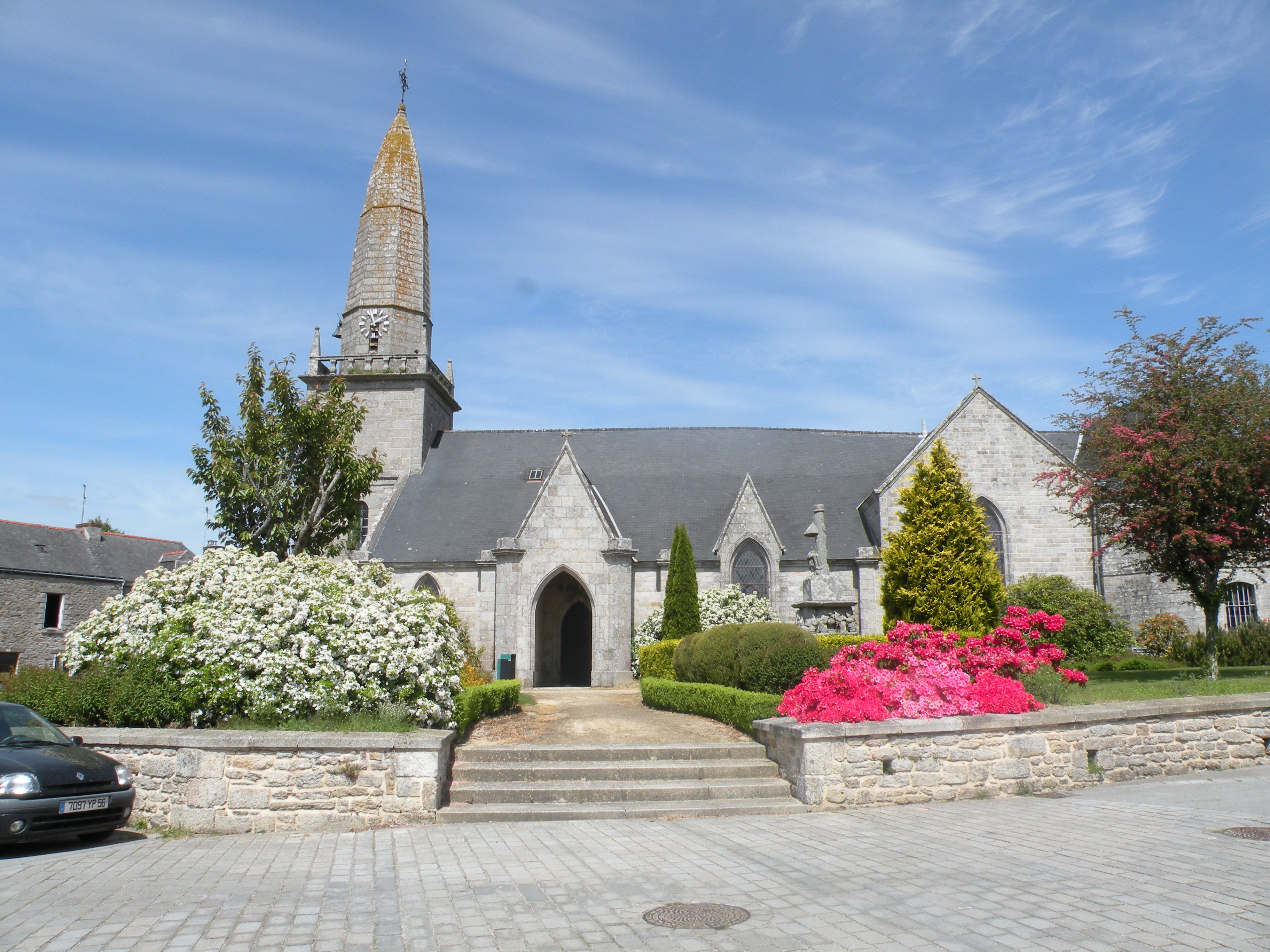 eglise de Malguénac